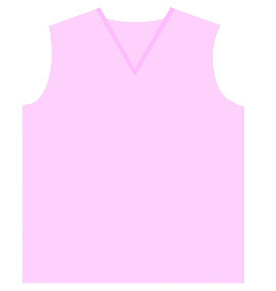 春日のピンクベスト